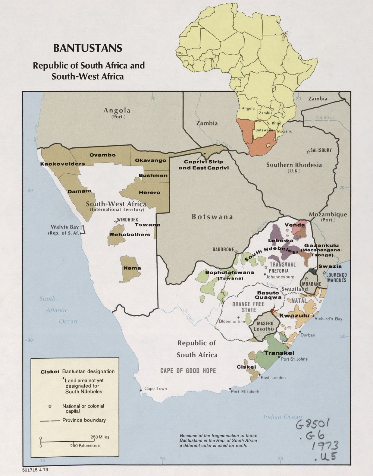 1973 Bantustans